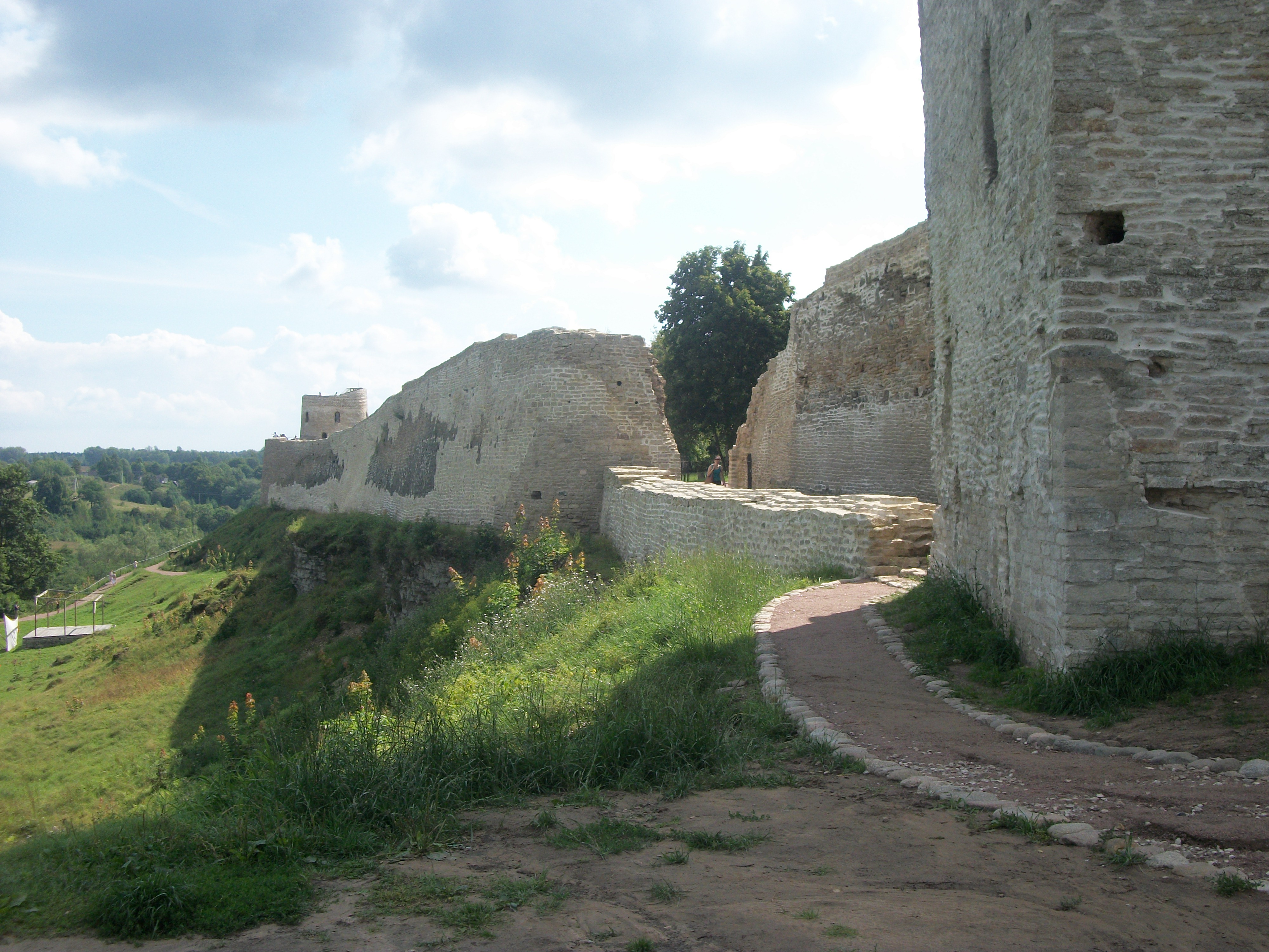 Внутри Изборской крепости